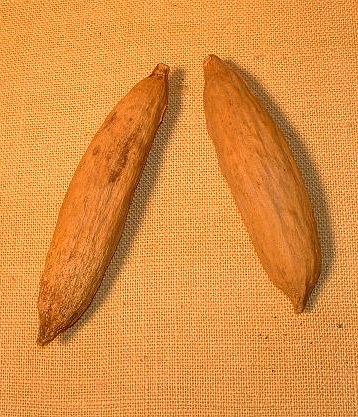 dried cabosse, Muséum d'histoire naturelle de Gray